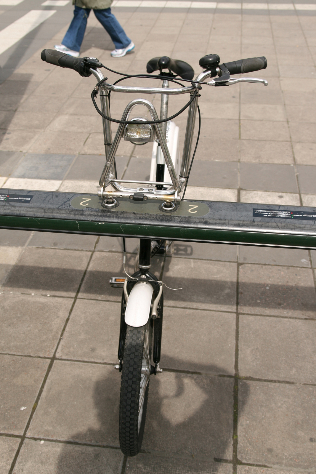 Velo SVD à Norrmalmstorg à Stockholm